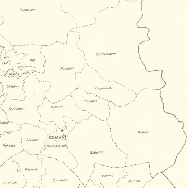 Suomi, tilastokartta 1947: Kainuun kunnat. Vuonna 1947 Kainuuseen kuuluivat kunnat Säräisniemi, Paltamo, Puolanka, Hyrynsalmi, Suomussalmi, Ristijärvi, Vuolijoki, Sotkamo, Kajaani, Kajaanin maalaiskunta ja Kuhmo.